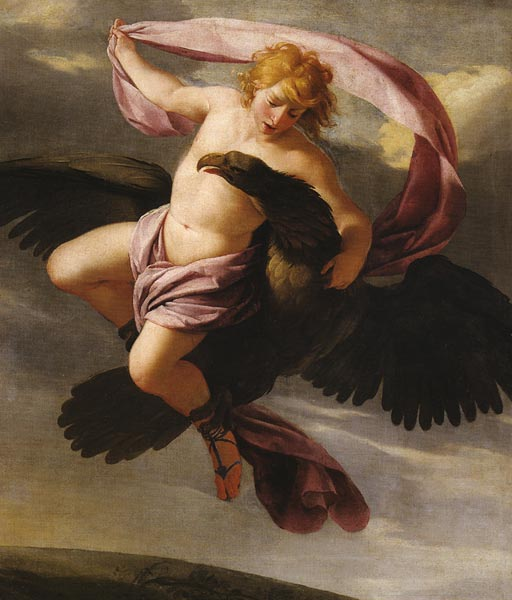 detail